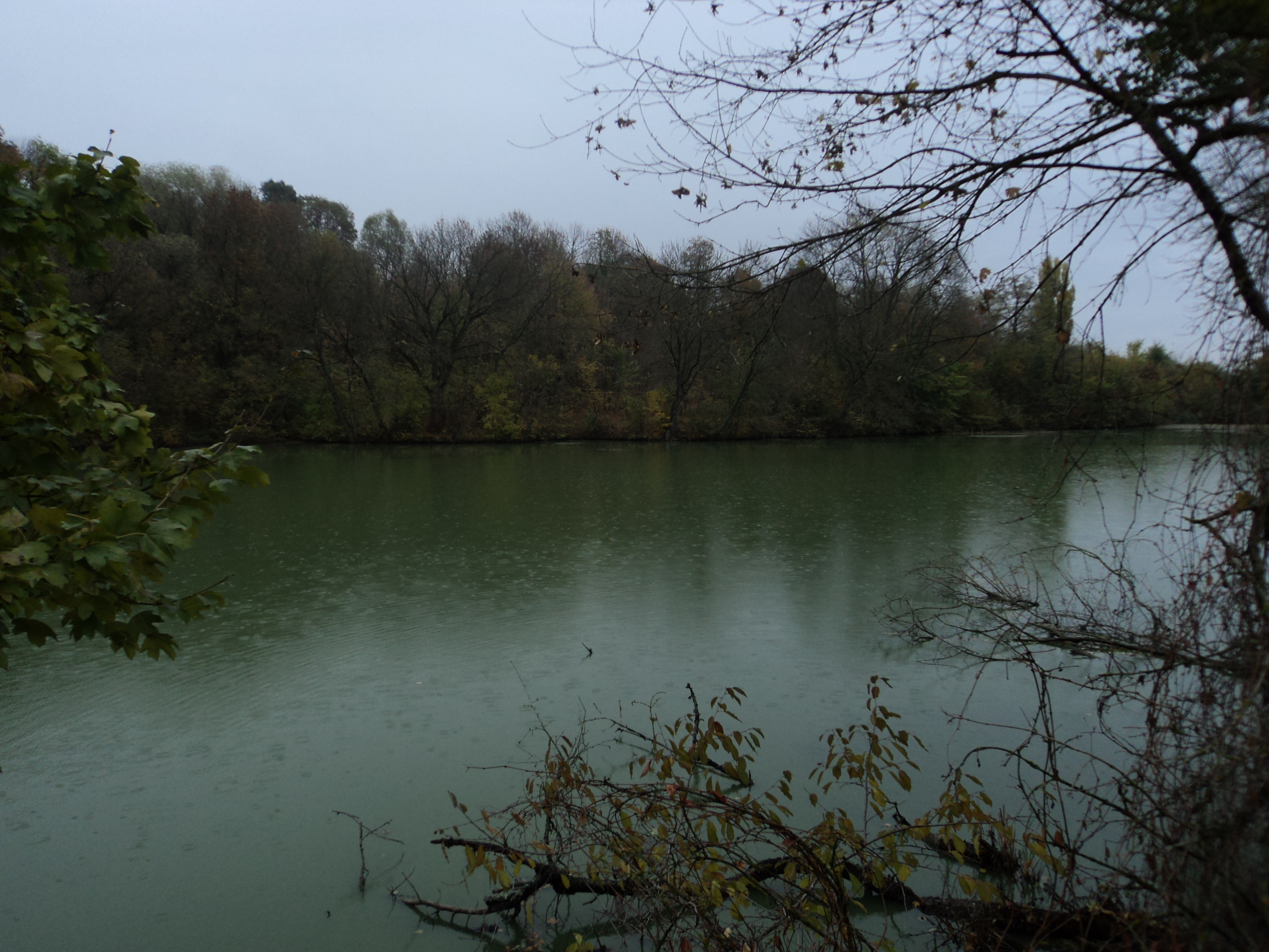 Немерчанський парк, Муровано -Куриловецький район, с. Немерче